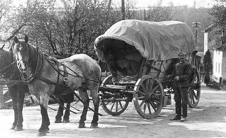 Original image description from the Deutsche Fotothek Triebischtal-Miltitz. Mühlenwagen der Miltitzer Mühle mit Müller Albin Furkert 1912